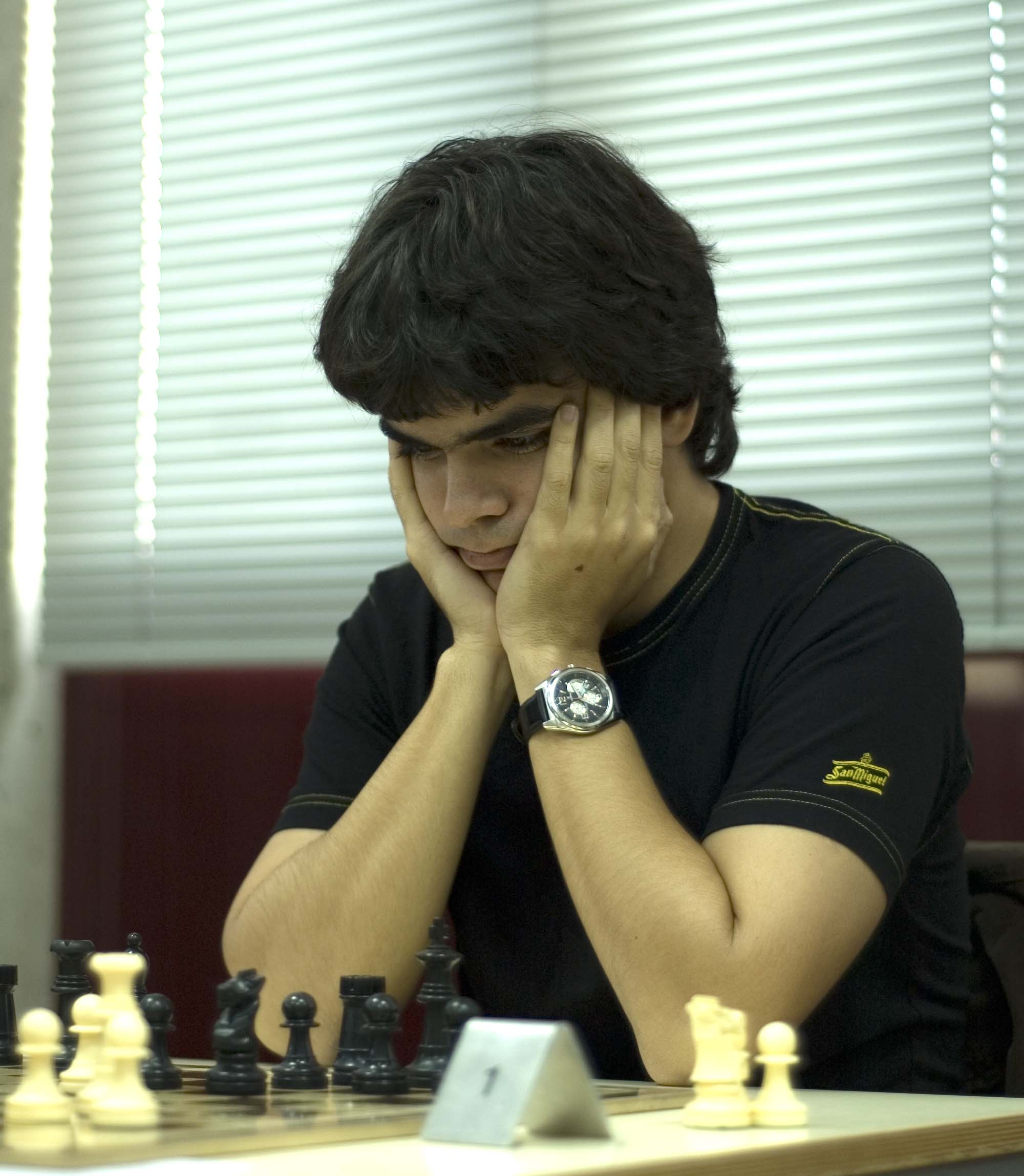 Holden Hernández disputando la 3ª ronda del Open Internacional de Moratalaz (Madrid).